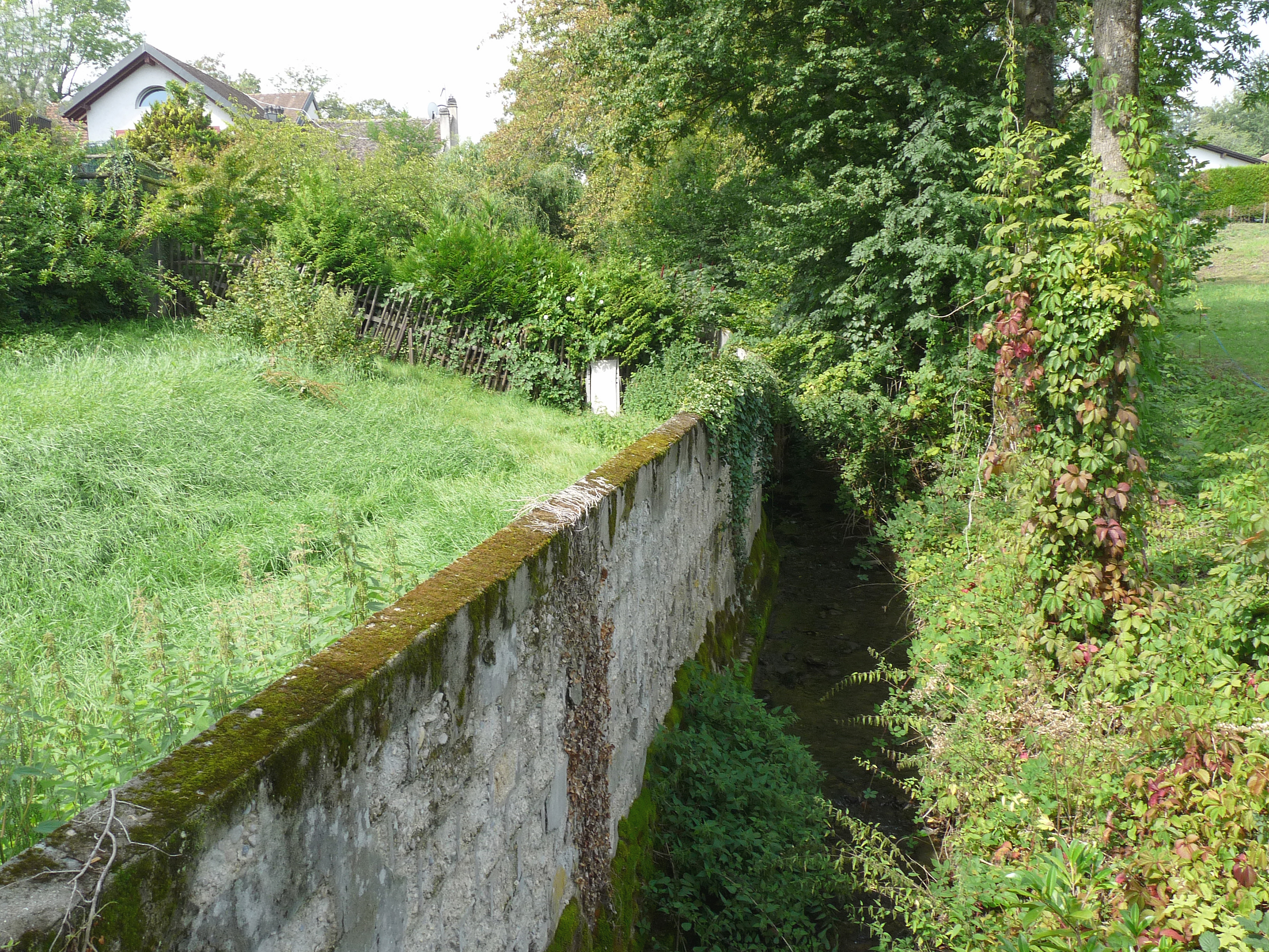 Le Greny à Commugny (canton de Vaud, Suisse)